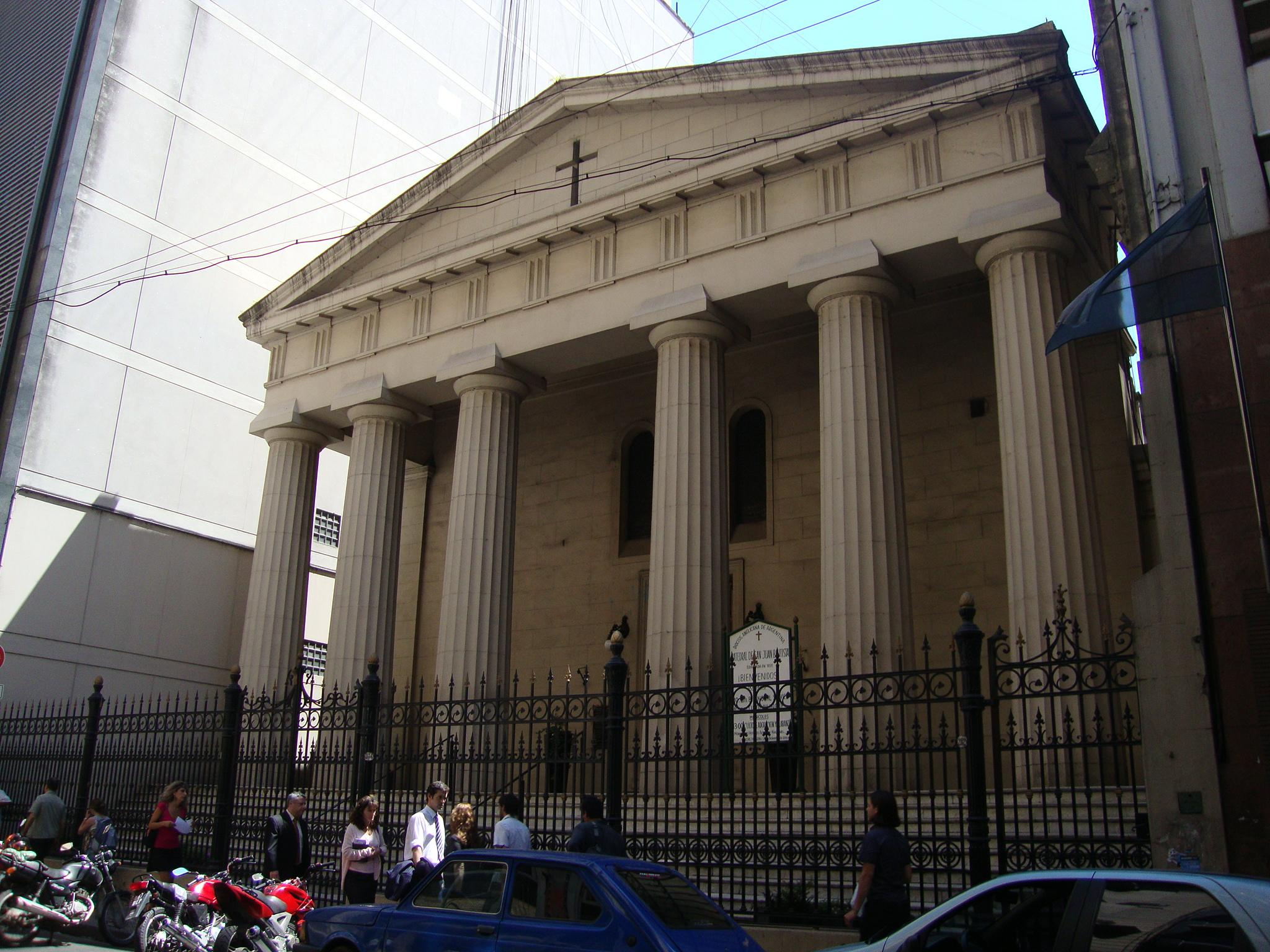 Fachada neoclásica de la Catedral San Juan Bautista de la Diócesis Anglicana de Argentina. Obra del arquitecto escocés Richard Adams, de 1831. Calle 25 de Mayo 282, Buenos Aires.